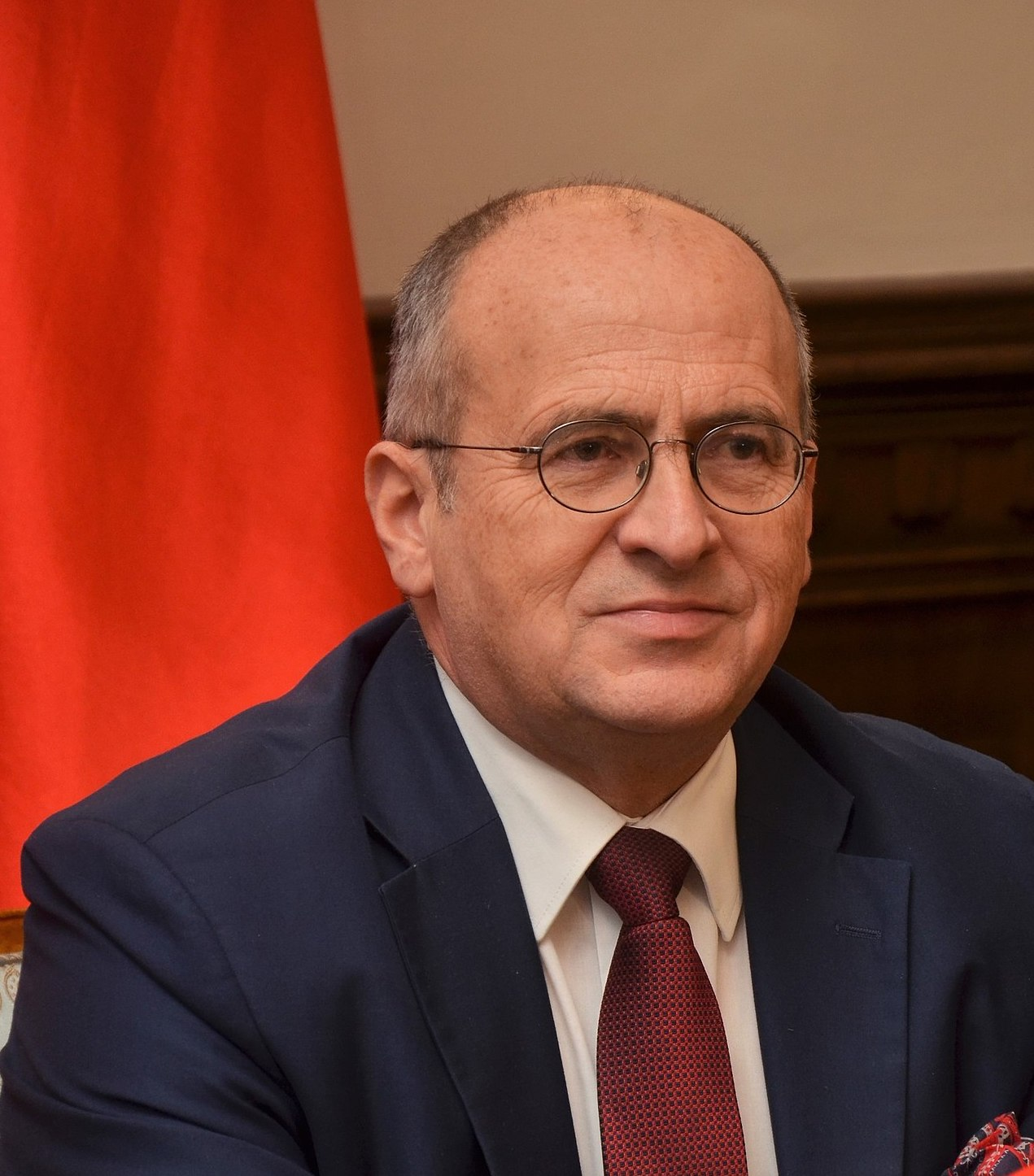 Zbigniew Rau